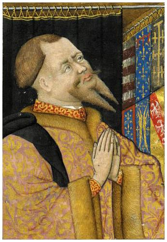 Portrait de René d'Anjou en prière. Heures de René d'Anjou, Angers, 1437 ? (Mss, ms. latin 1156 A, folio 81, verso, Bibliothèque nationale de France, Paris).